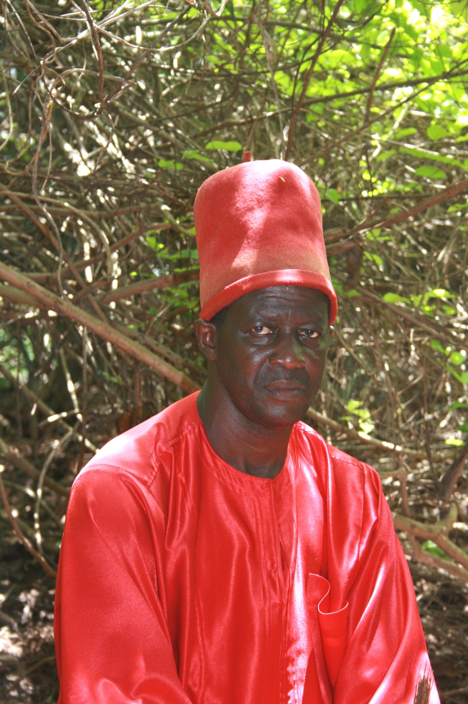 Sibulumbaï Diédhiou, Roi d'Oussouye en Casamance (Sénégal) Ethnie des diolas (floups)